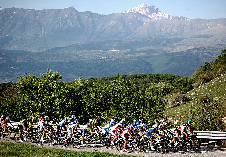 The Gruppetto towards Rocca di Cambio (6,5 km to go)